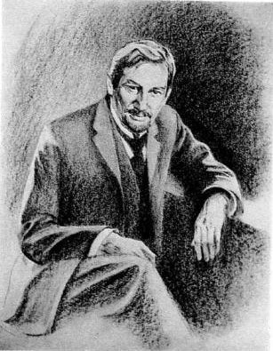 Портрет Ольгерда Обуховича-Бандинелли